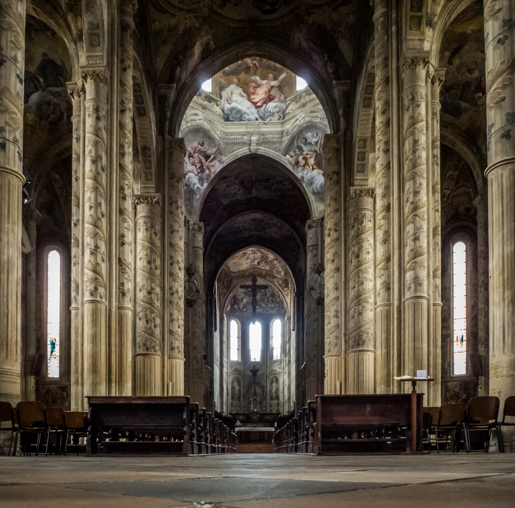 Complesso Episcopale della Cattedrale This is a photo of a monument which is part of cultural heritage of Italy.